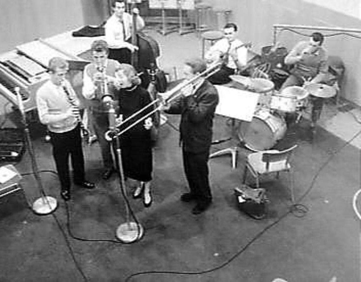 Pat Halcox (trompet); Chris Barber (trombone); Monty Sunshine (klarinet); Eddie Smith (banjo); Dick Smith (bas); Ron Bowden (drums); Ottilie Patterson (zang). Studio, 14 Febr. 1957